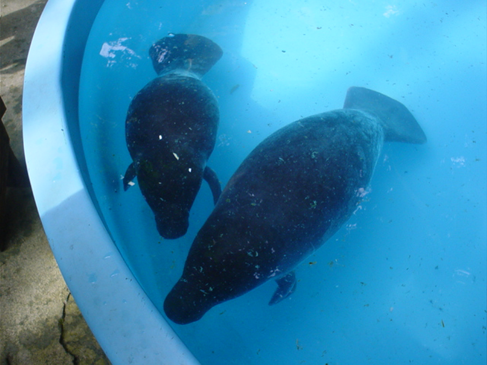 Rundschwanzseekuh mit Jungem im Bosque da Ciencia in Manaus